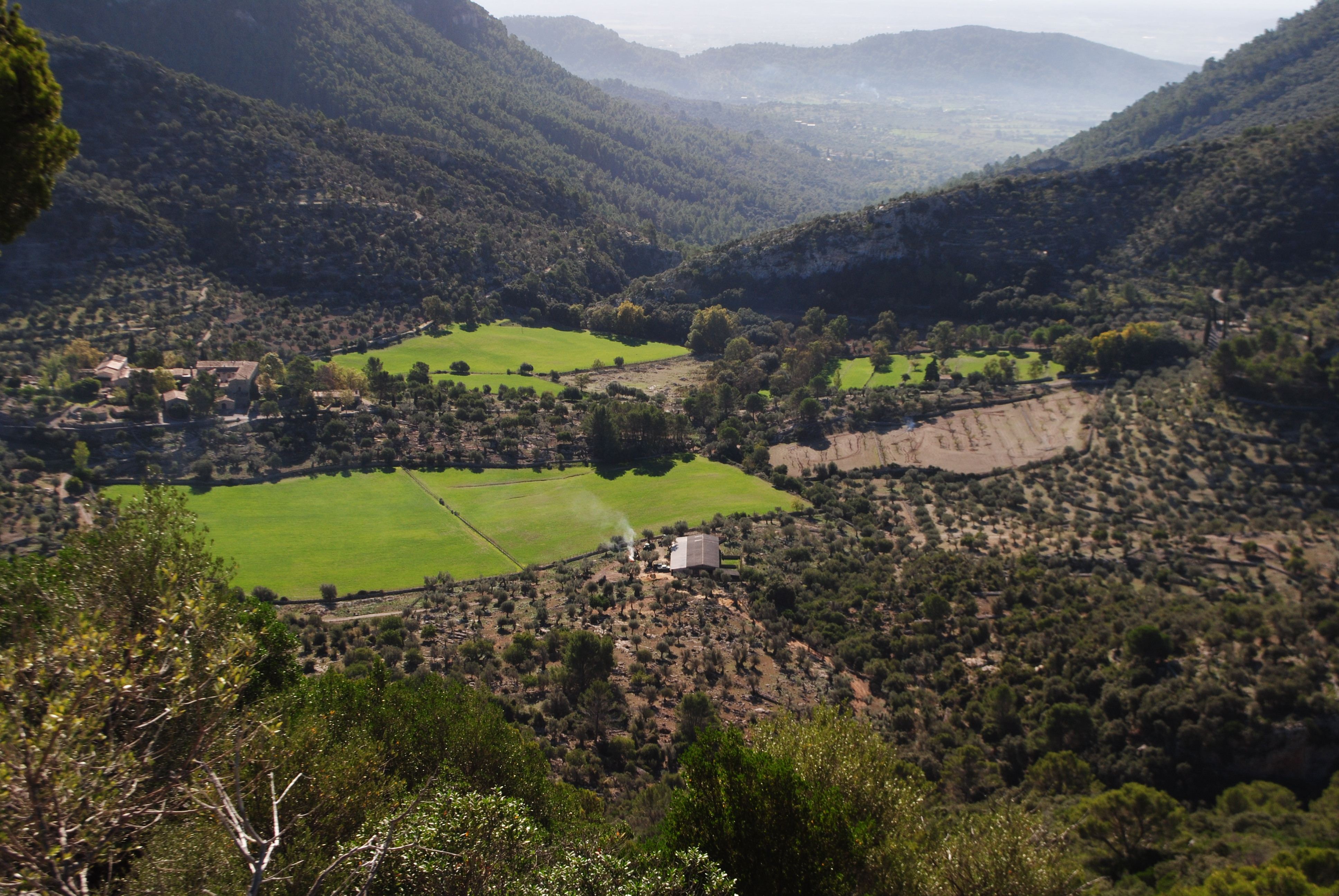 Pla de Solleric